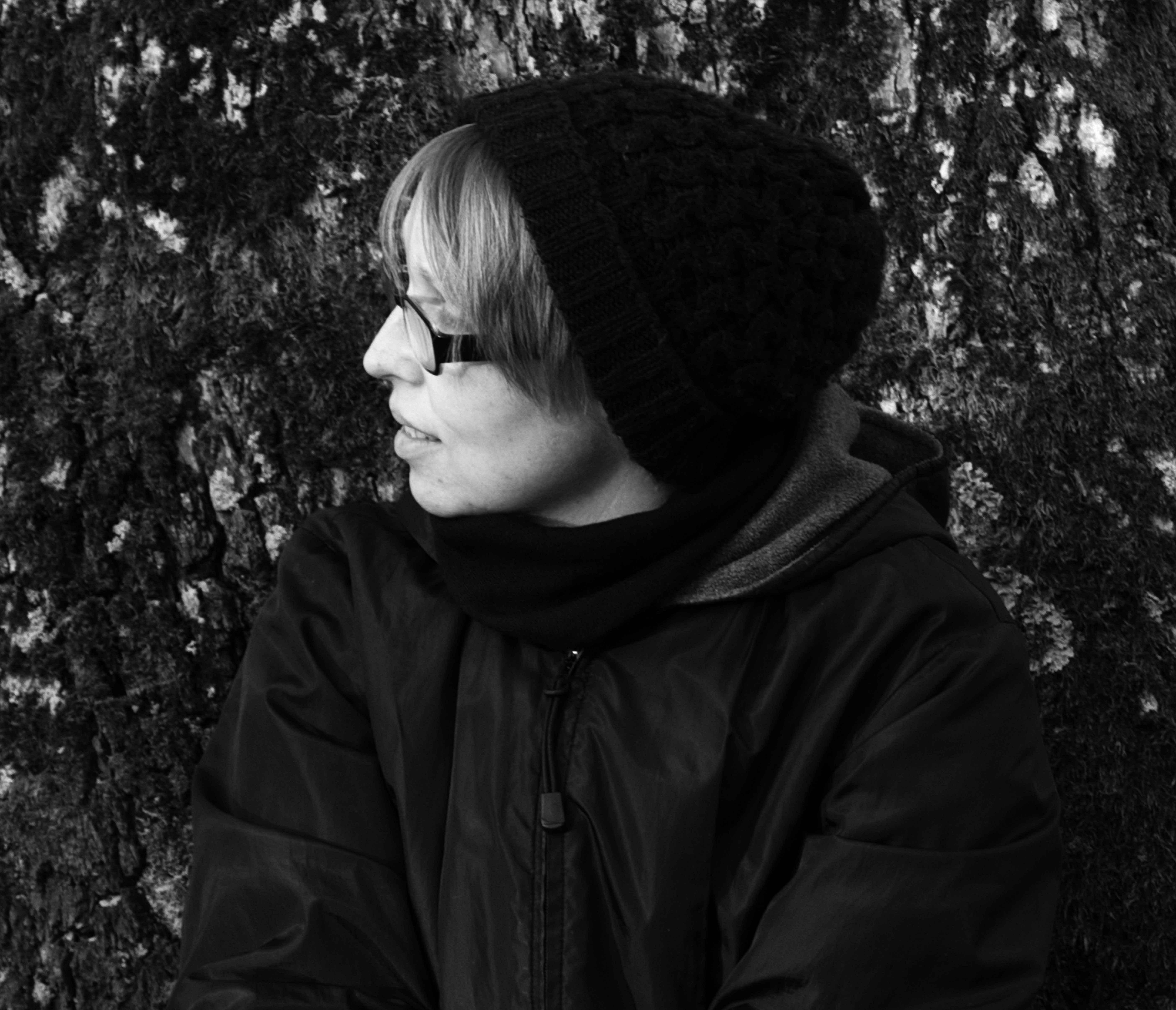 Joanna Concejo, 2014